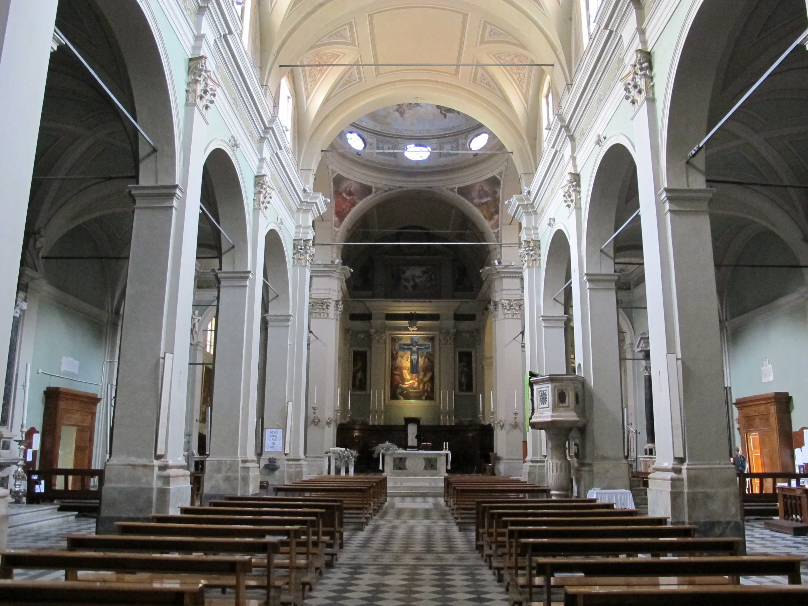 Camaiore, collegiata, interno 00.2